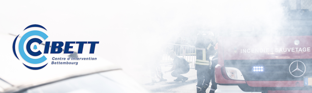 CIBETT